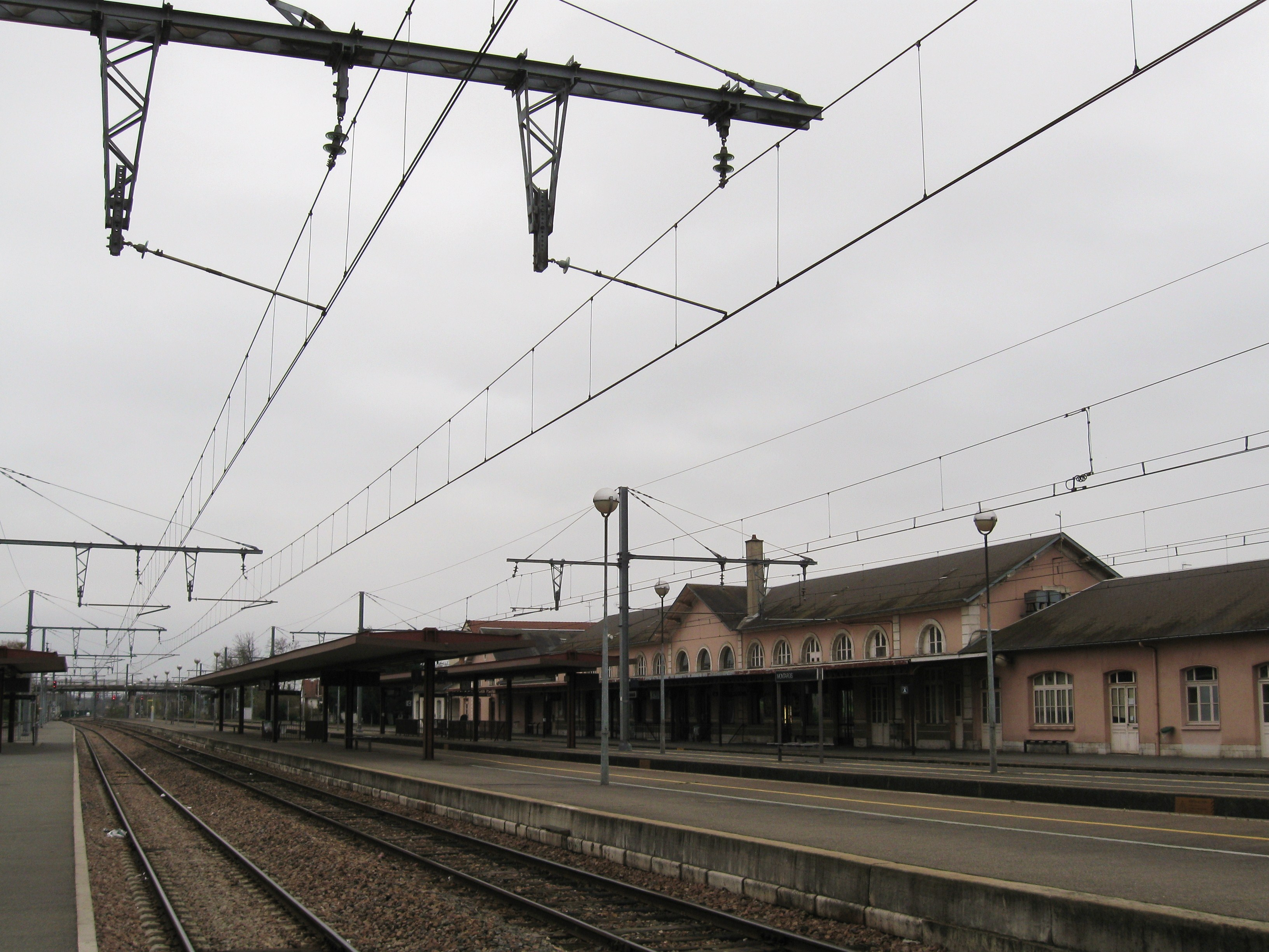 Gare de Montargis, Loiret, France